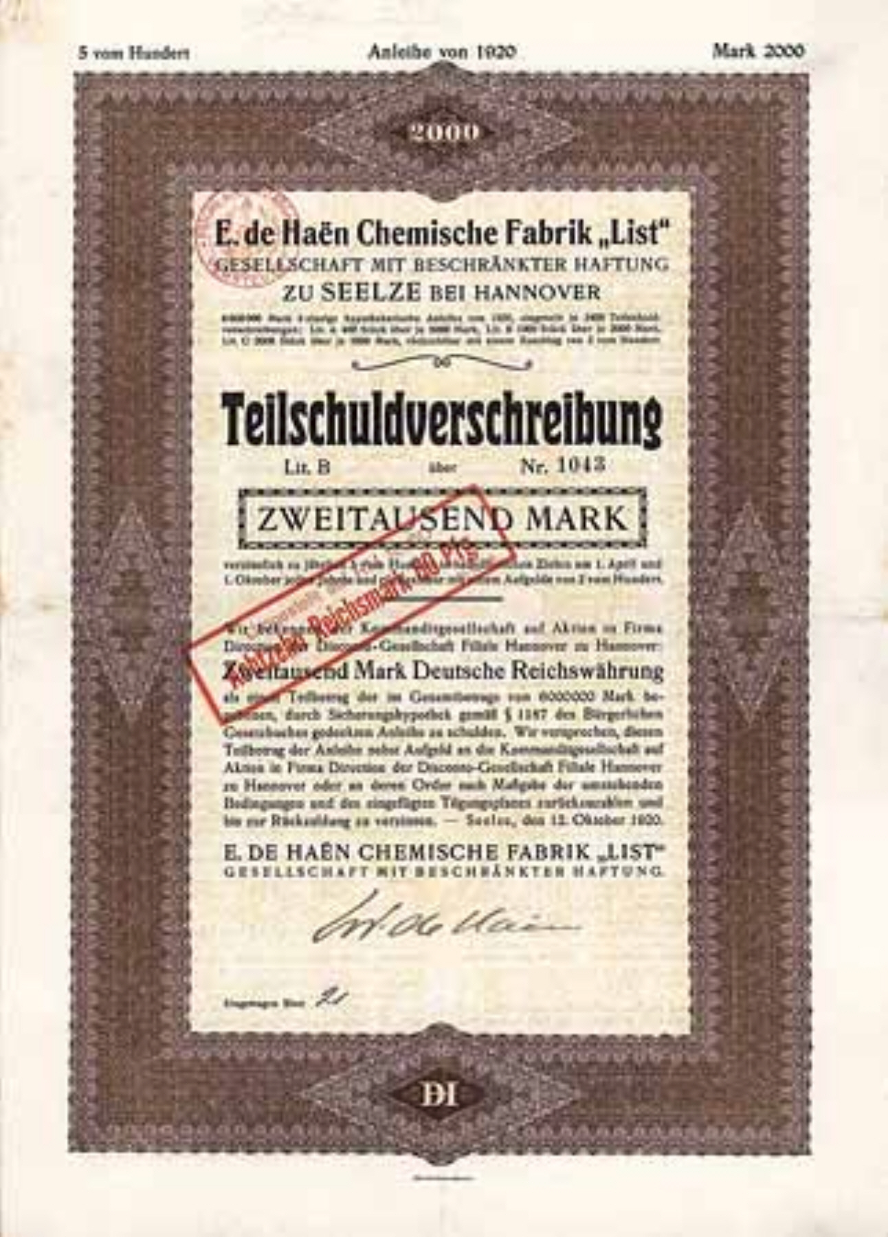 Teilschuldverschreibung der E. de Haen Chemische Fabrik "List" GmbH, 5% Zins, 2000 Mark. – gezeichnet von Kommerzienrat Dr. Wilhelm de Haen